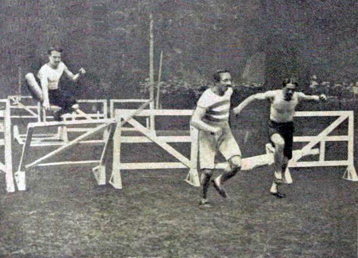 Adolphe Klingelhoeffer, en 1903 (Grand Prix de Paris du RCF, fête du bois de Boulogne, Croix-Catelan)